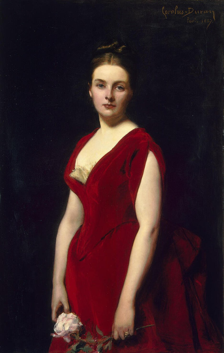 Анна Александровна Оболенская (1861/62—1917) — дочь Н. М. и А. А. Половцовых, жена князя, сенатора и члена Государственного Совета А. Д. Оболенского.